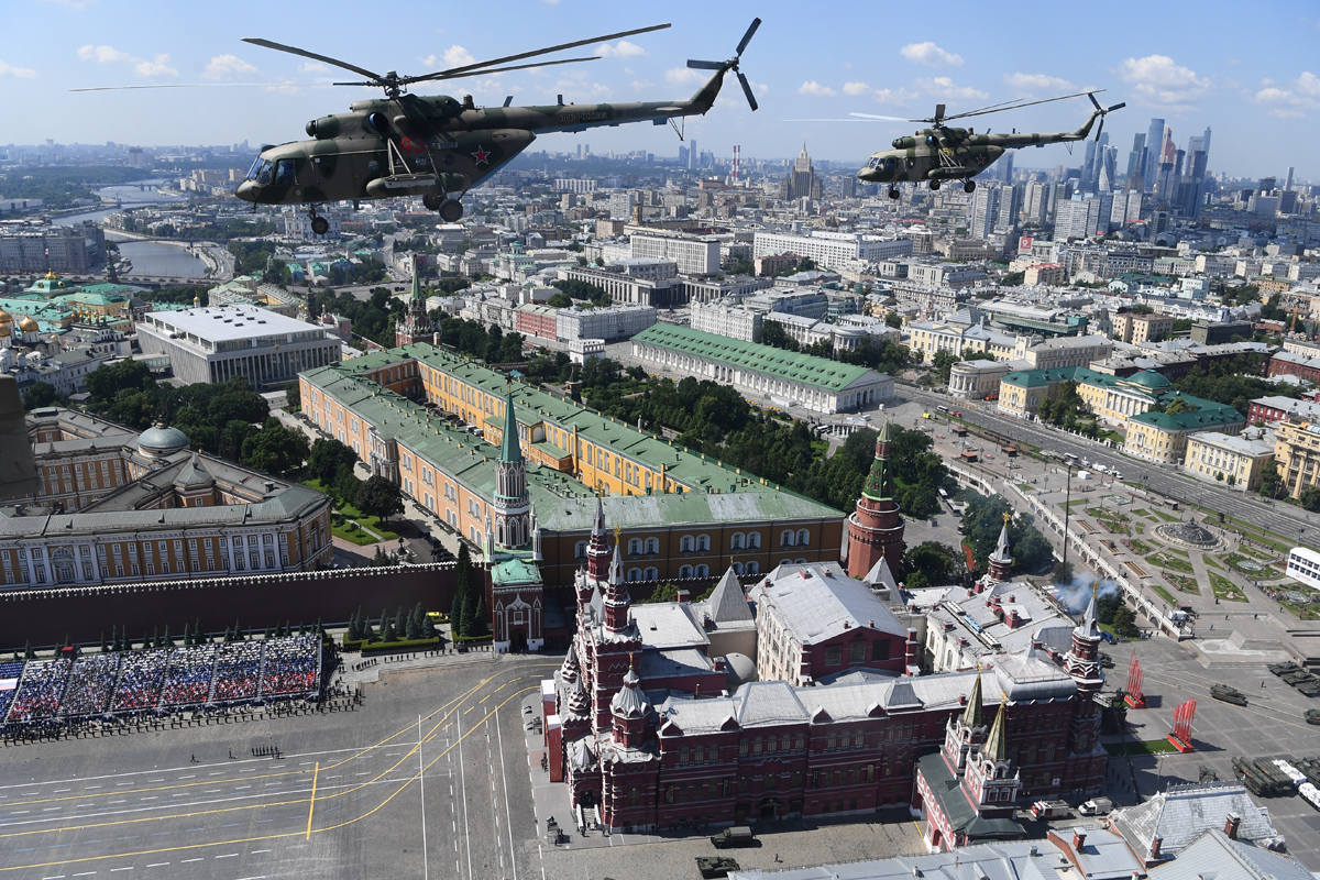 Многоцелевые вертолеты Ми-8 во время воздушной части военного парада в ознаменование 75-летия Победы в Великой Отечественной войне 1941-1945 годов в Москве.